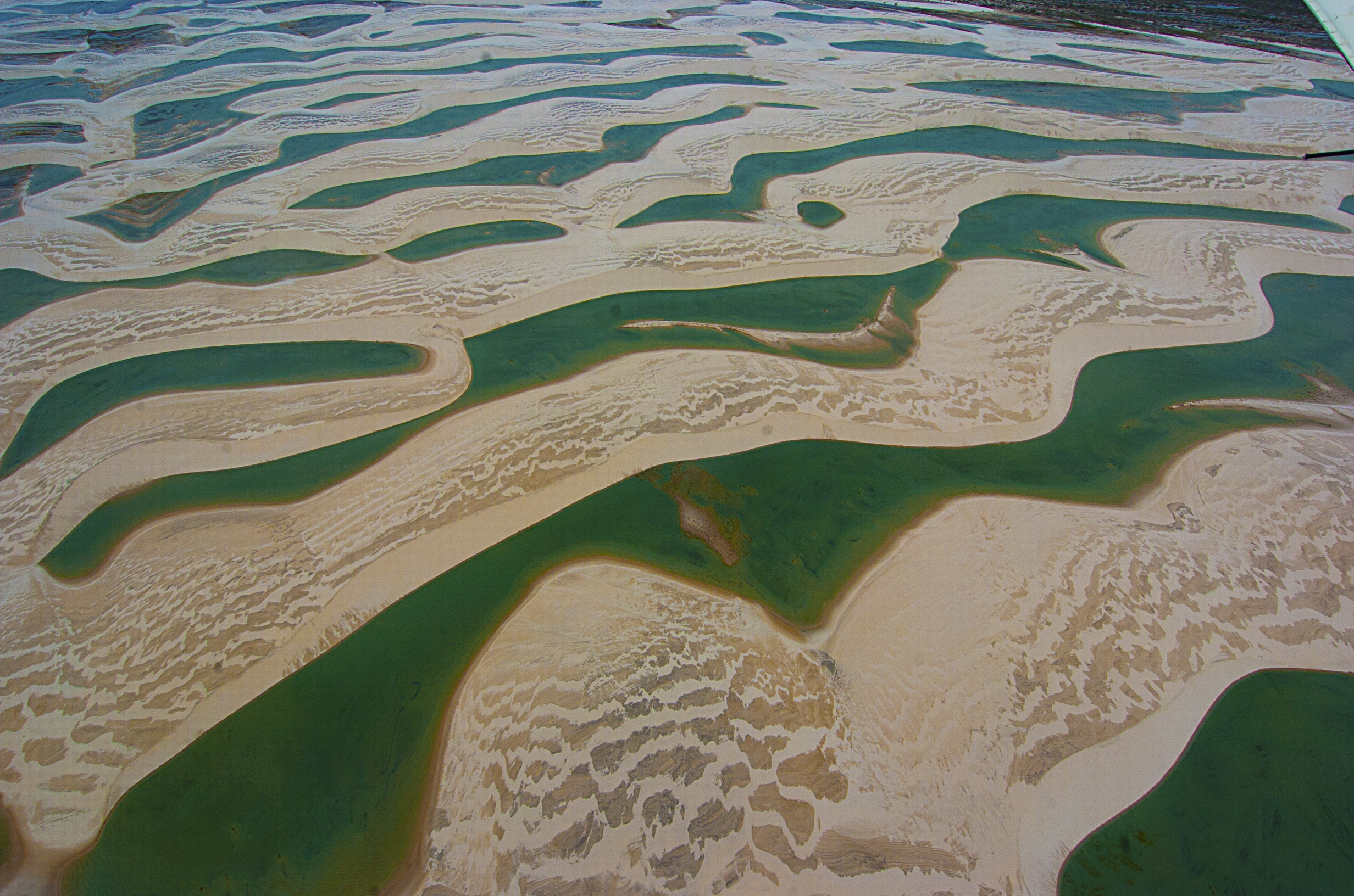 Parque Nacional dos Lençois Maranhenses